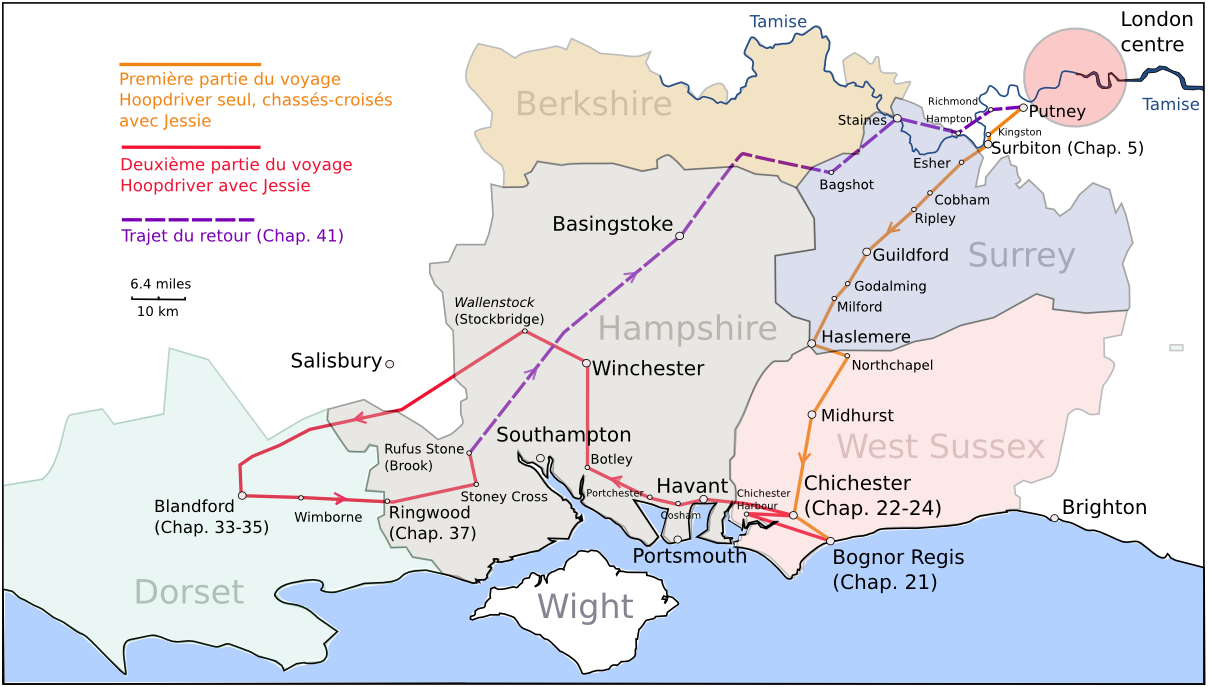 Itinéraire de Mr Hoopdriver dans le roman The Wheels of Chance, de H.G. Wells (1896)